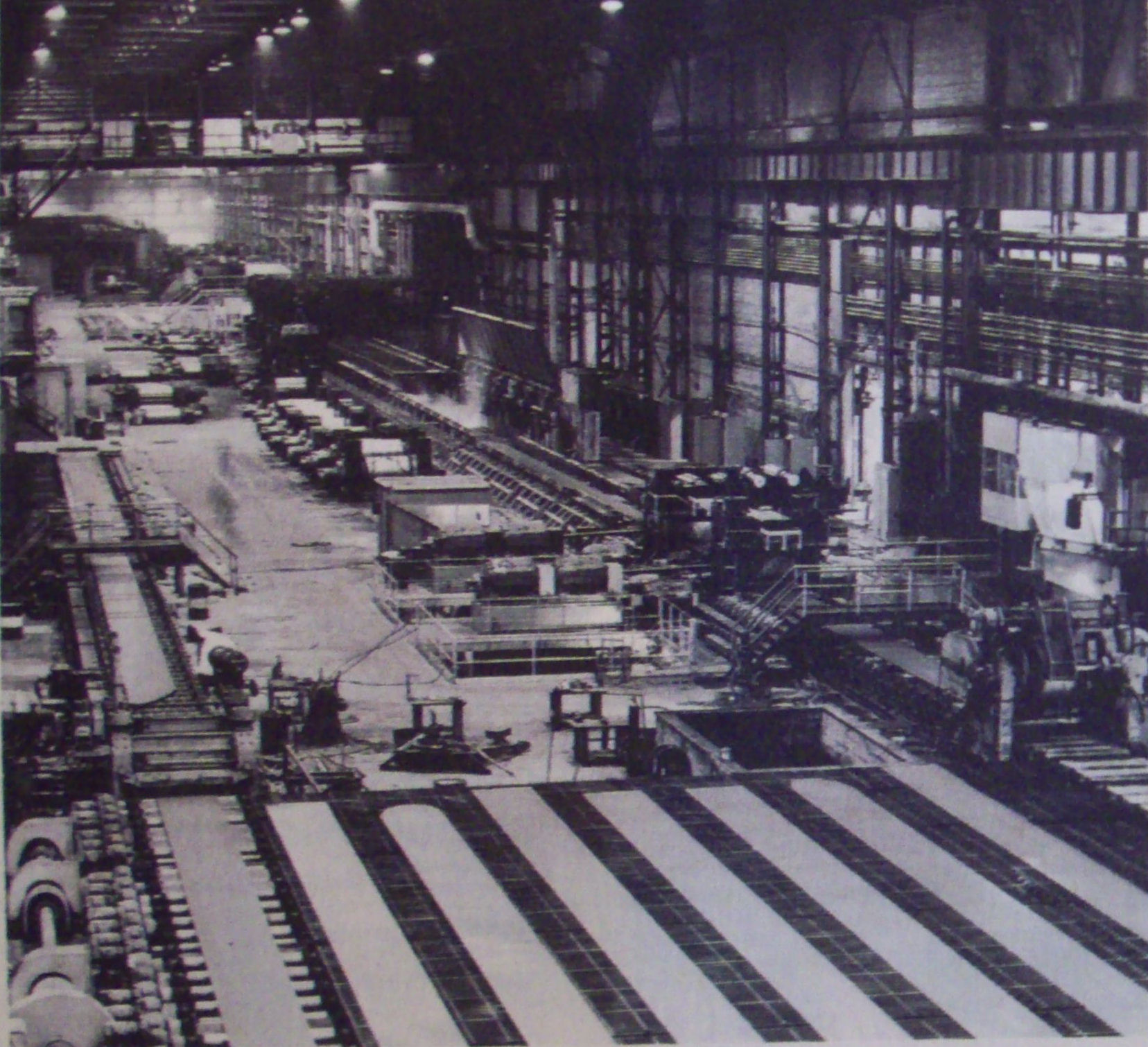 Es una foto del complejo siderúrgico SOMISA, se comenzó a construir en el segundo gobierno de Perón, pero la gran mayoria de este alto horno se termino en el gobierno desarrollista de Frondizi en 1960.